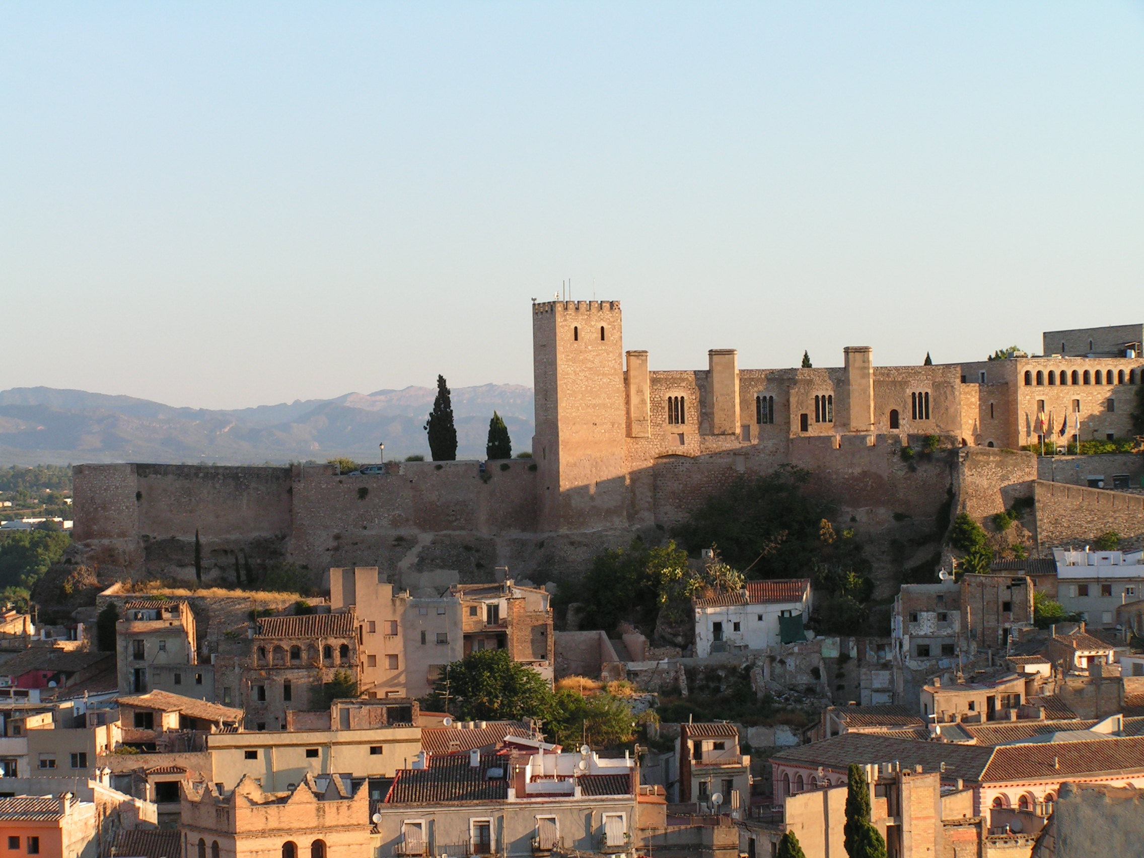 Castell-Parador de La Suda, a Tortosa